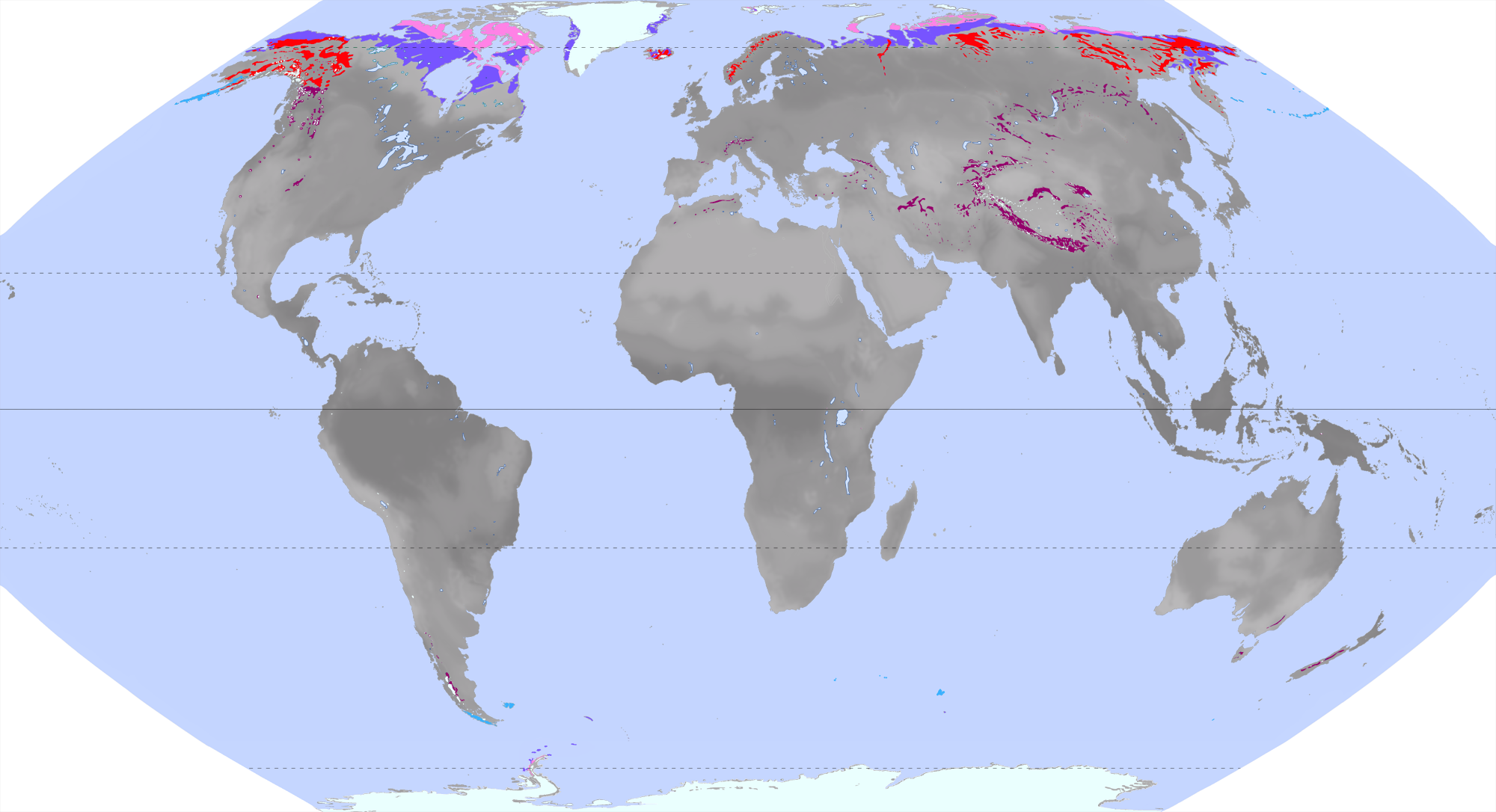 Quellen: Auszug der Wikimedia-Karte Vegetationszonen.png, ebenfalls mein eigenes Werk Kartographie Eckert VI-Projektion (nahezu flächentreu, realistische Größenverhältnisse, relativ wenig verzerrt), erstellt mit (Lizenz CC-BY) Datengrundlagen → siehe: Literaturangaben der Originalkarte Legende (German) Die verwendeten Farben entsprechen nicht der Legende der Originalkarte! Die Modifikation wurde vorgenommen, um die Erkennbarkeit der Flächen auf der Vorschaukarte zu erhöhen. Flechten- u. Moostundra Zwergstrauch- u. Wiesentundra Subpolare Bergtundra Bergtundren der gemäßigten Breiten sowie azonale alpine Matten u. Heiden Subpolare Wiesen, Heiden und Moore